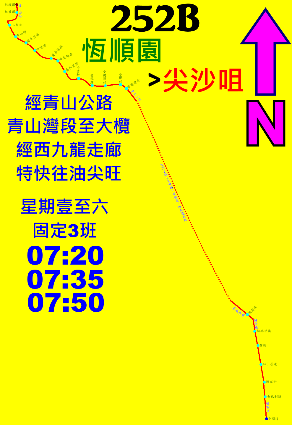 中文（香港）: 九巴252B線的走線圖